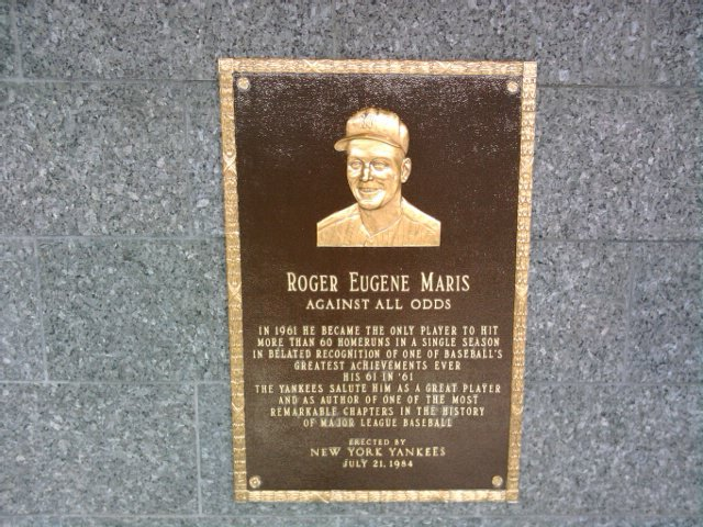 Roger Maris' plaque in Monument Park in Yankee Stadium